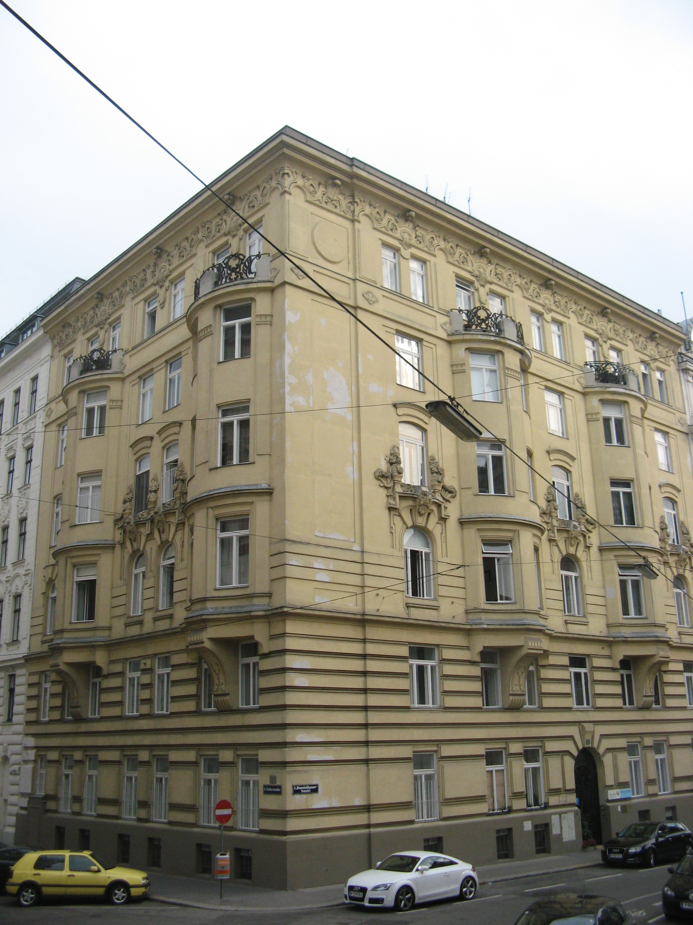 Dominikanerbastei Nr. 6 (1906) von Theodor Bach, Wien-Innere Stadt